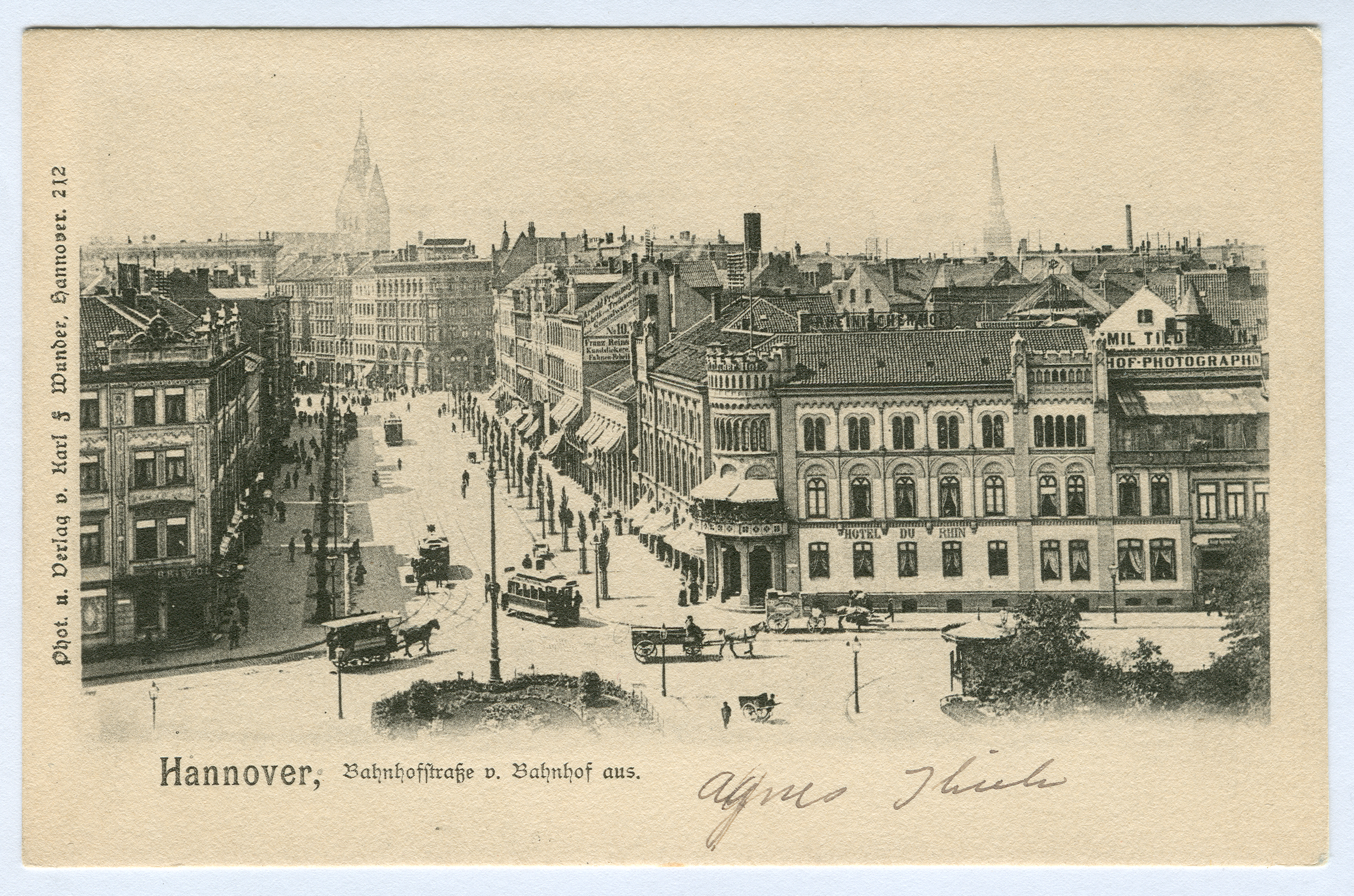 Fotografien von Karl Friedrich Wunder mit Vor- und Rückseite